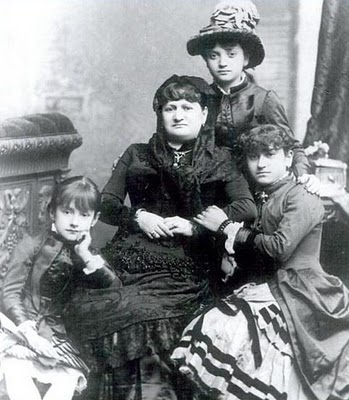 Antonia Moreno de Cáceres, reconocida mujer que defendió al Perú durante la Guerra del Pacífico.